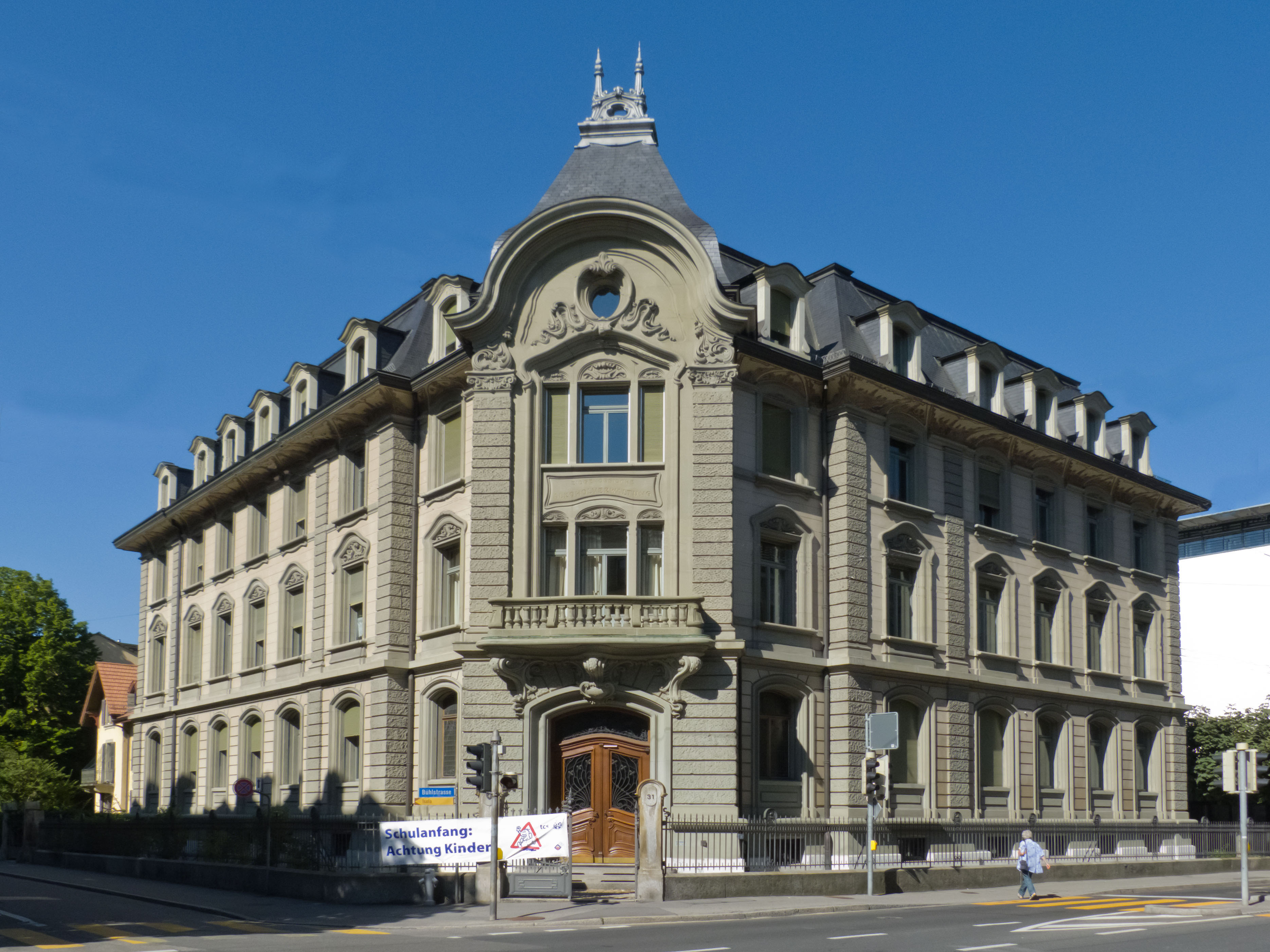 Bürogebäude mit Sandsteinfassaden im Jugendstil. Schmiedeiserner Zaun